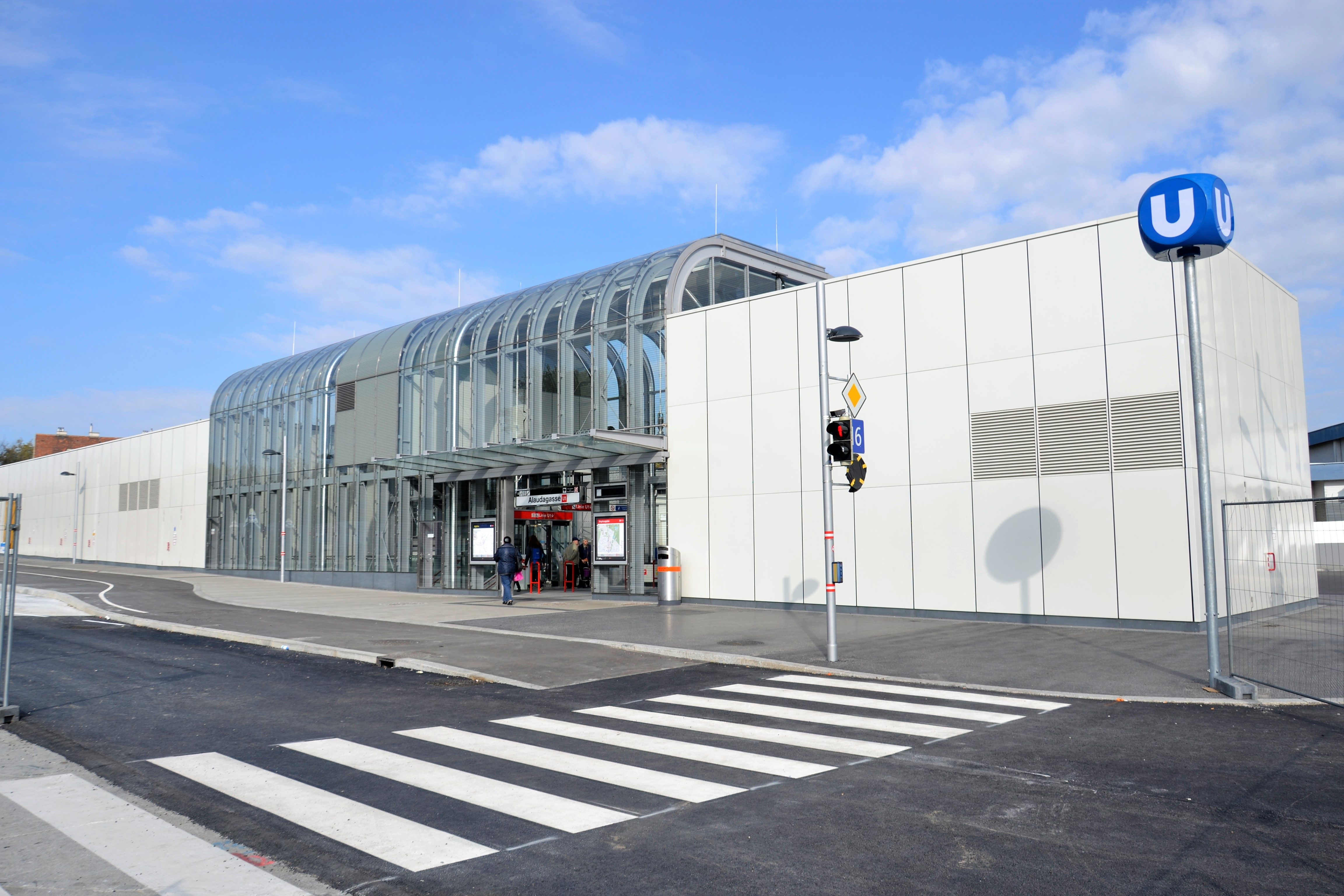 Die U-Bahn-Station Alaudagasse ist eine U-Bahn-Station der U-Bahn-Linie U1 in Wien. Auf dieser Aufnahme ist das Aufnahmegebäude Anfang Oktober 2017, knapp einen Monat nach der Eröffnung, zu sehen.